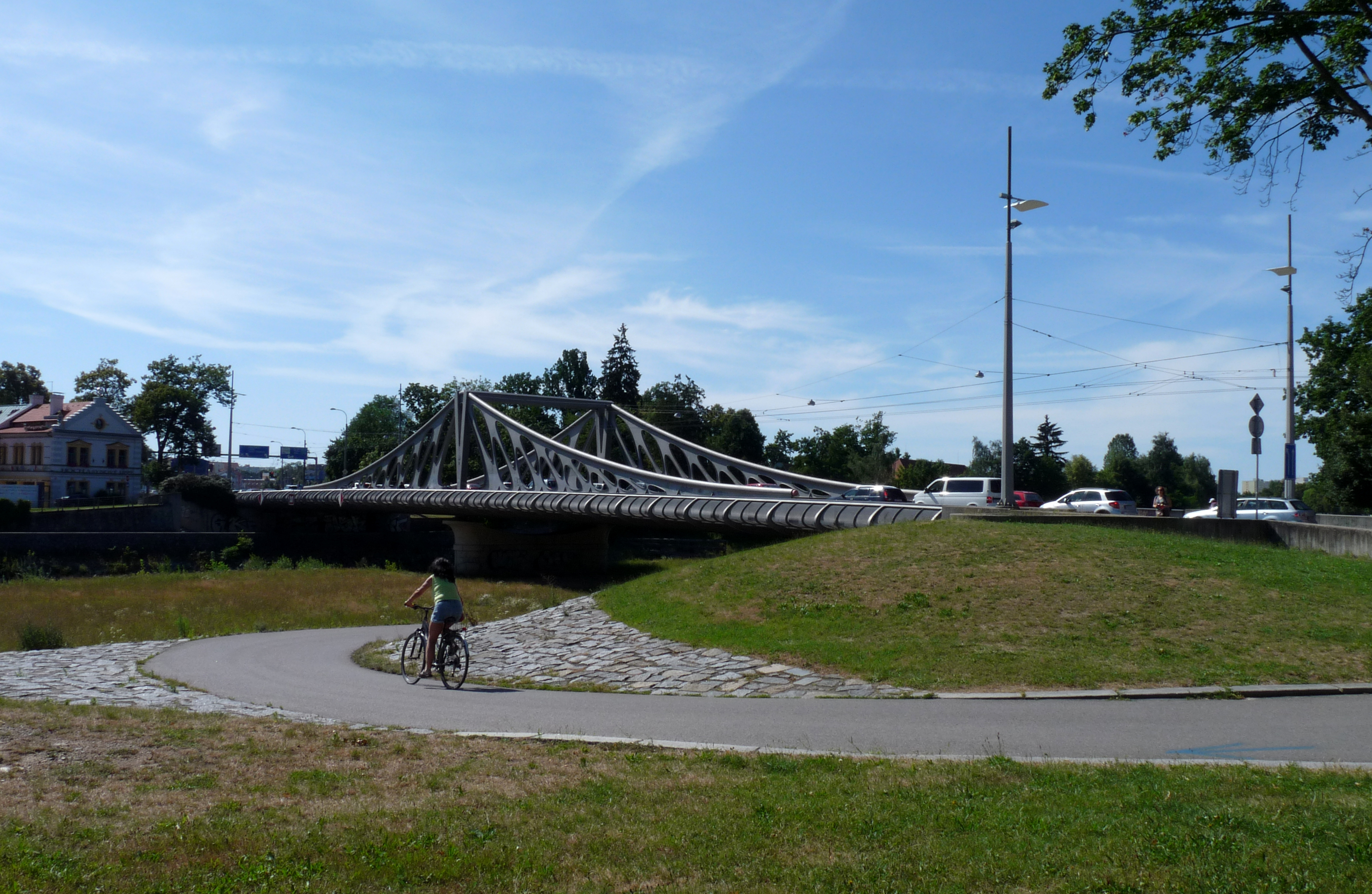 Cyklistická trasa č. 12 vedoucí pod Dlouhý most, České Budějovice.